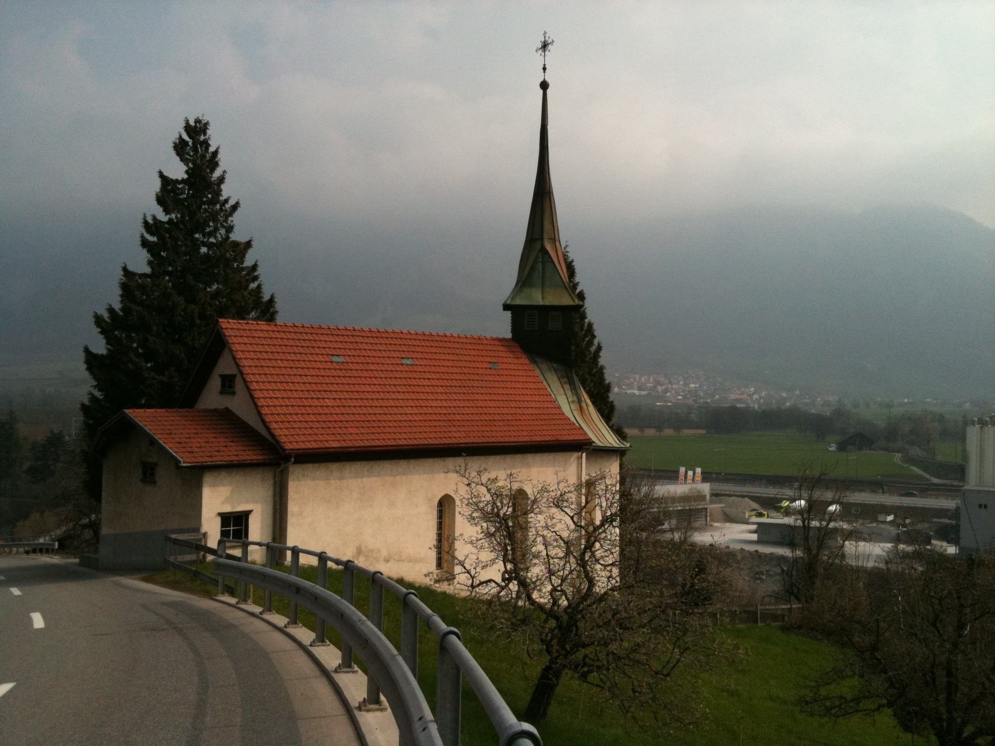 reformierte Kirche Mastrils, Kanton Graubünden